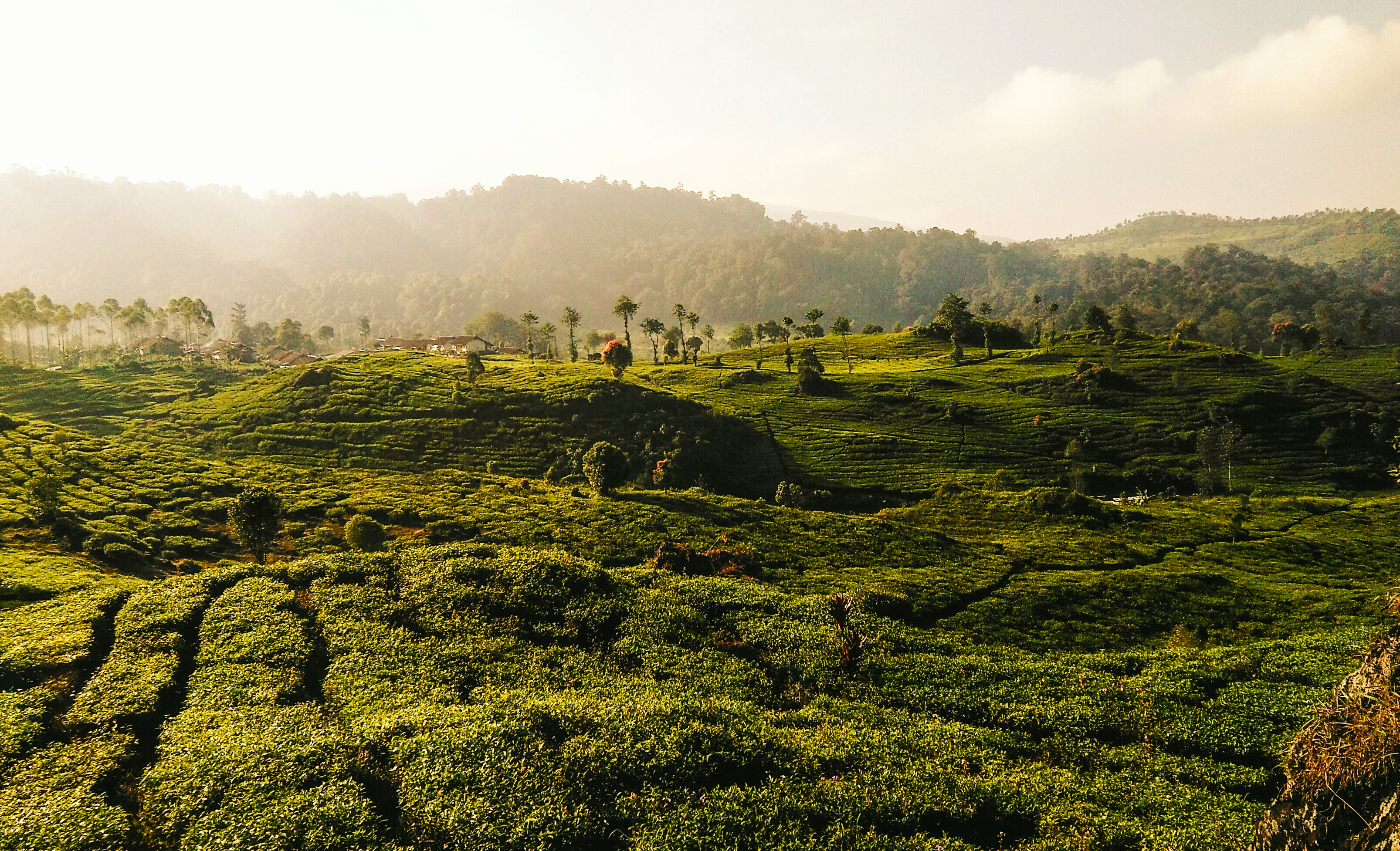 foto ini saya ambil ketika saya pergi ke glamping lake sade rancabali, karena lokasi yang berada di tengah tengah perkebunan teh rancabali jadi saya sempatkan dulu untuk mengabmbil foto ini